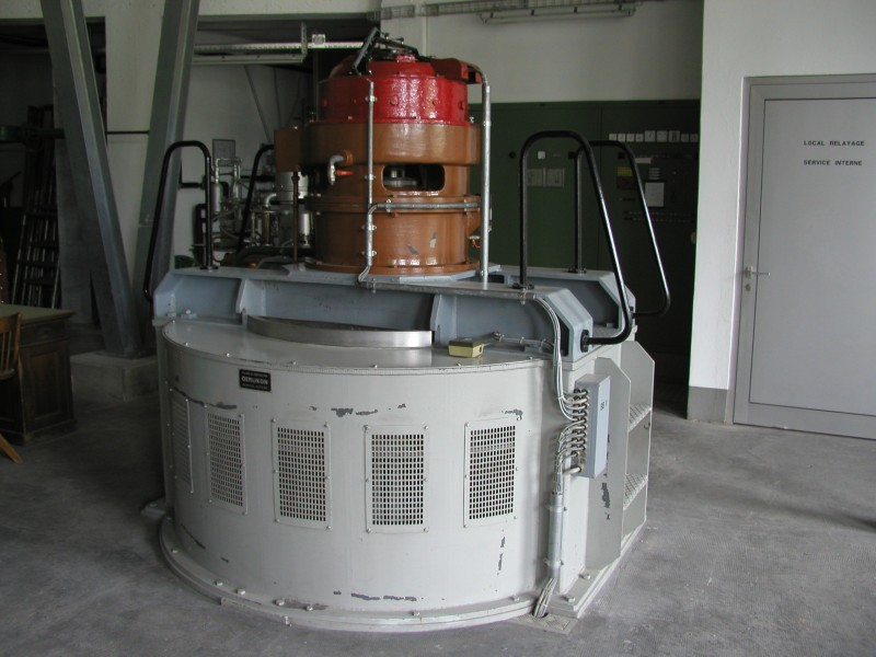 Turbine/generator group at Maigrauge dotation plant, Switzerland